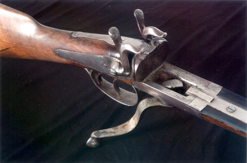 Fusil Casimir Lefaucheux Léopold Bernard Culasse vue de l'intérieur